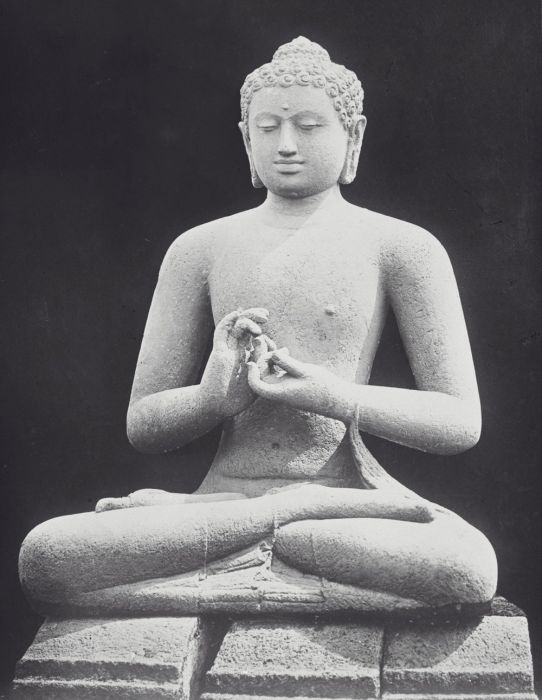 Foto. Boeddhabeeld (Cakyamuni) op de Boroboedoer